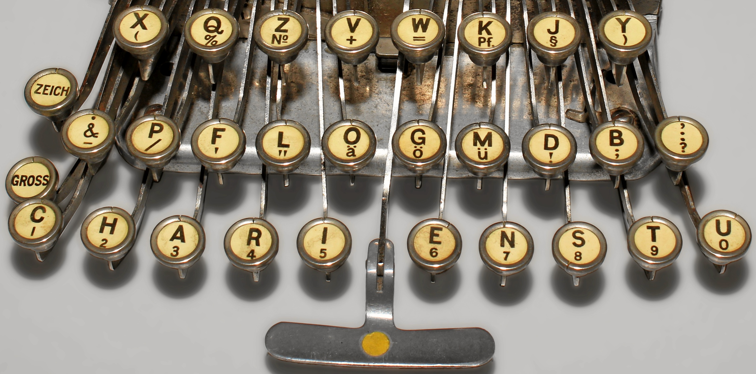 Blickensderfer No 6